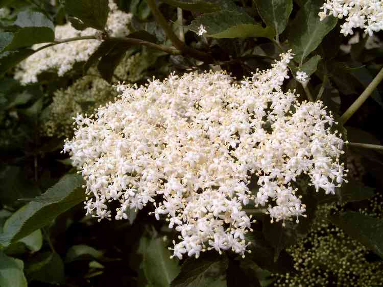 Sambucus nigra, Blüte